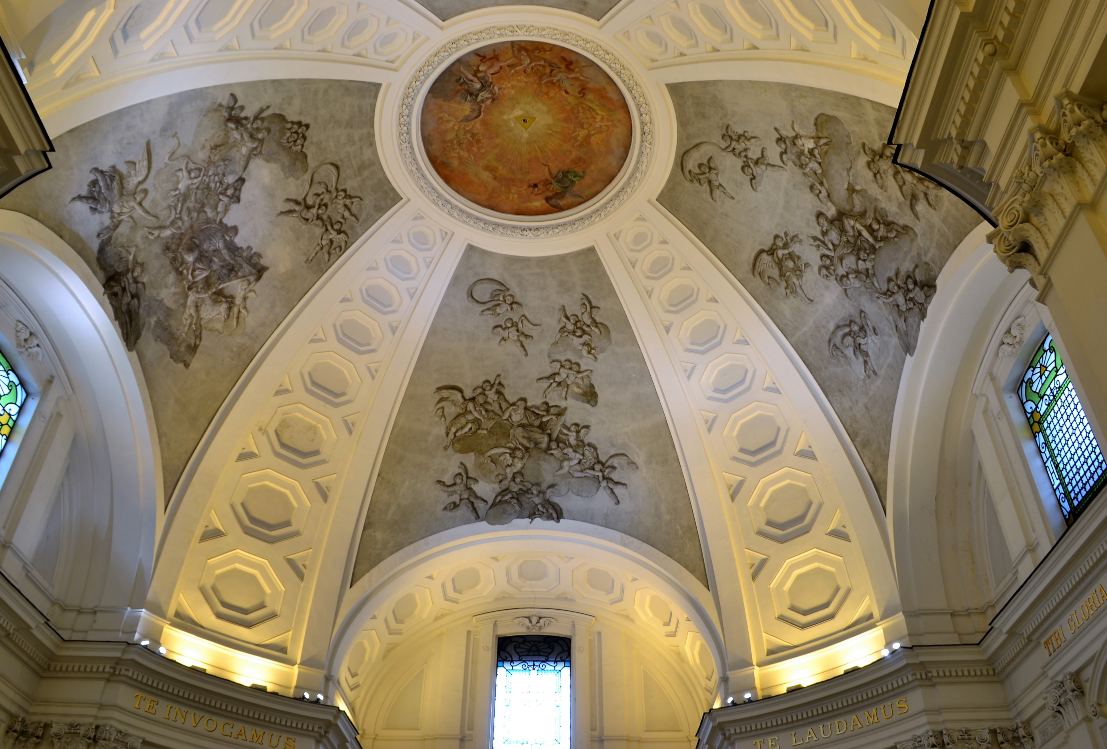 Chiesa della Santissima Trinità delle Monache